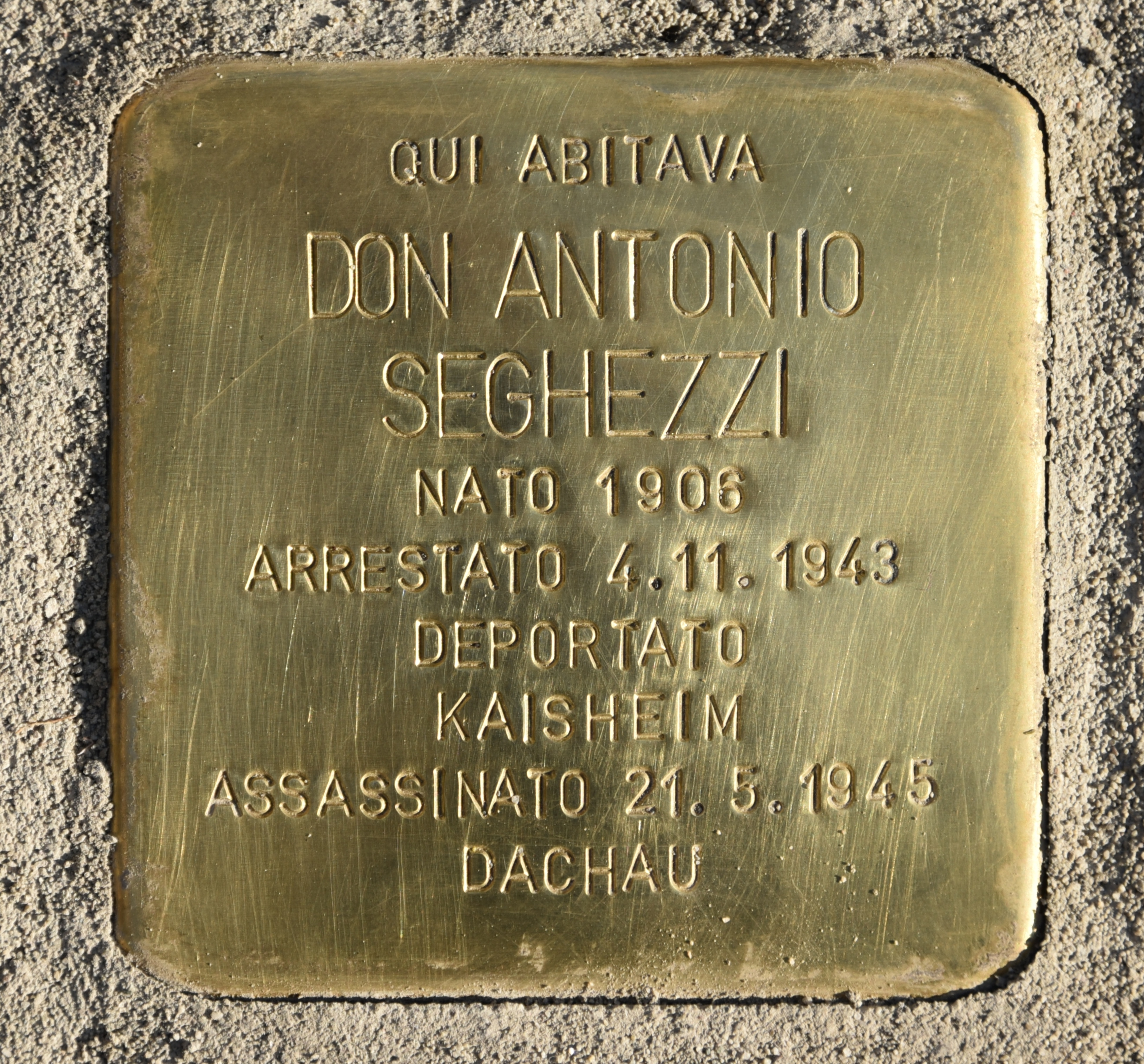 Stolperstein für Don Antonio Seghezzi